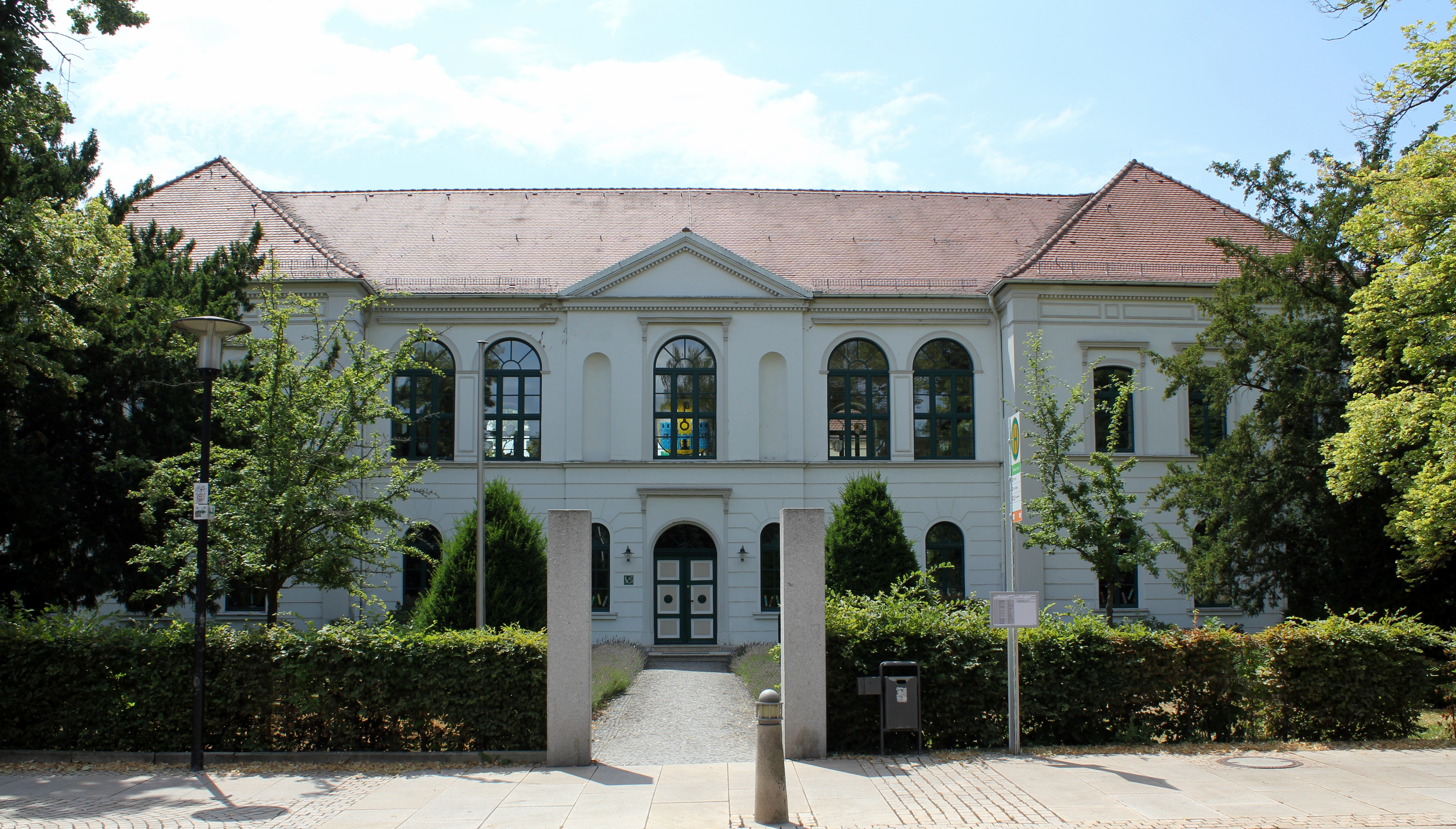 Schule Bülstringer Straße 25 Haldensleben